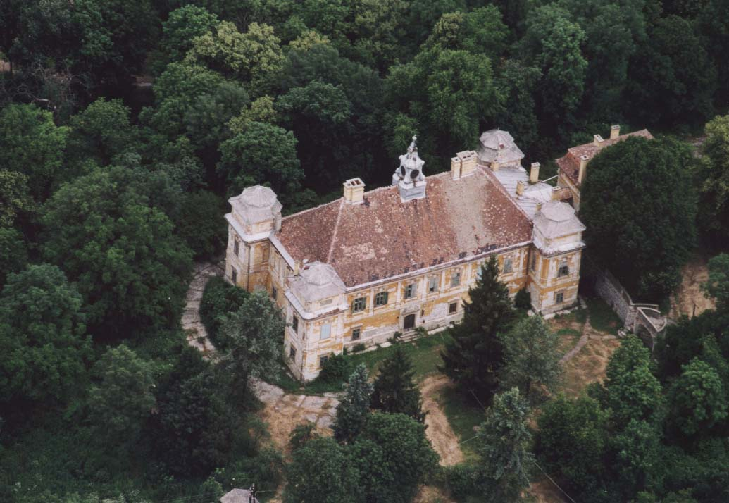 Acsa, Mansion - Hungary - Europe